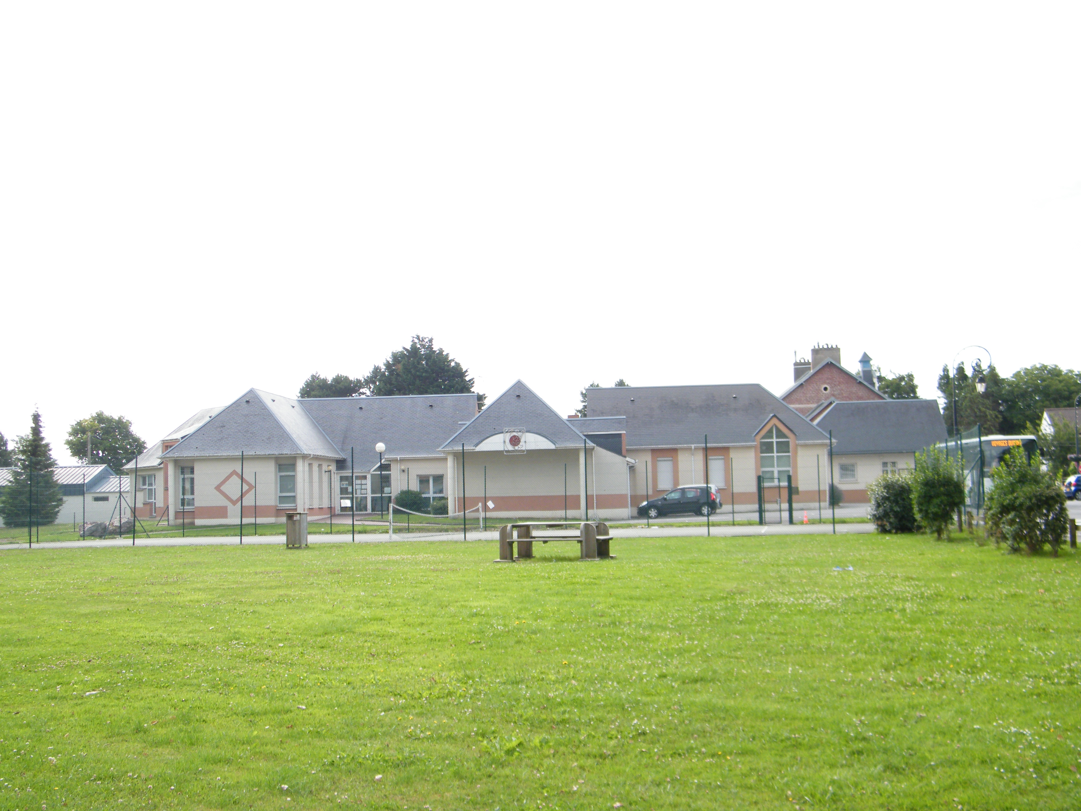 Groupe scolaire, Groffliers, Pas-de-Calais, France